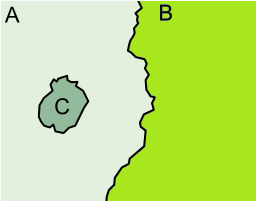 描述的是飞地的概念